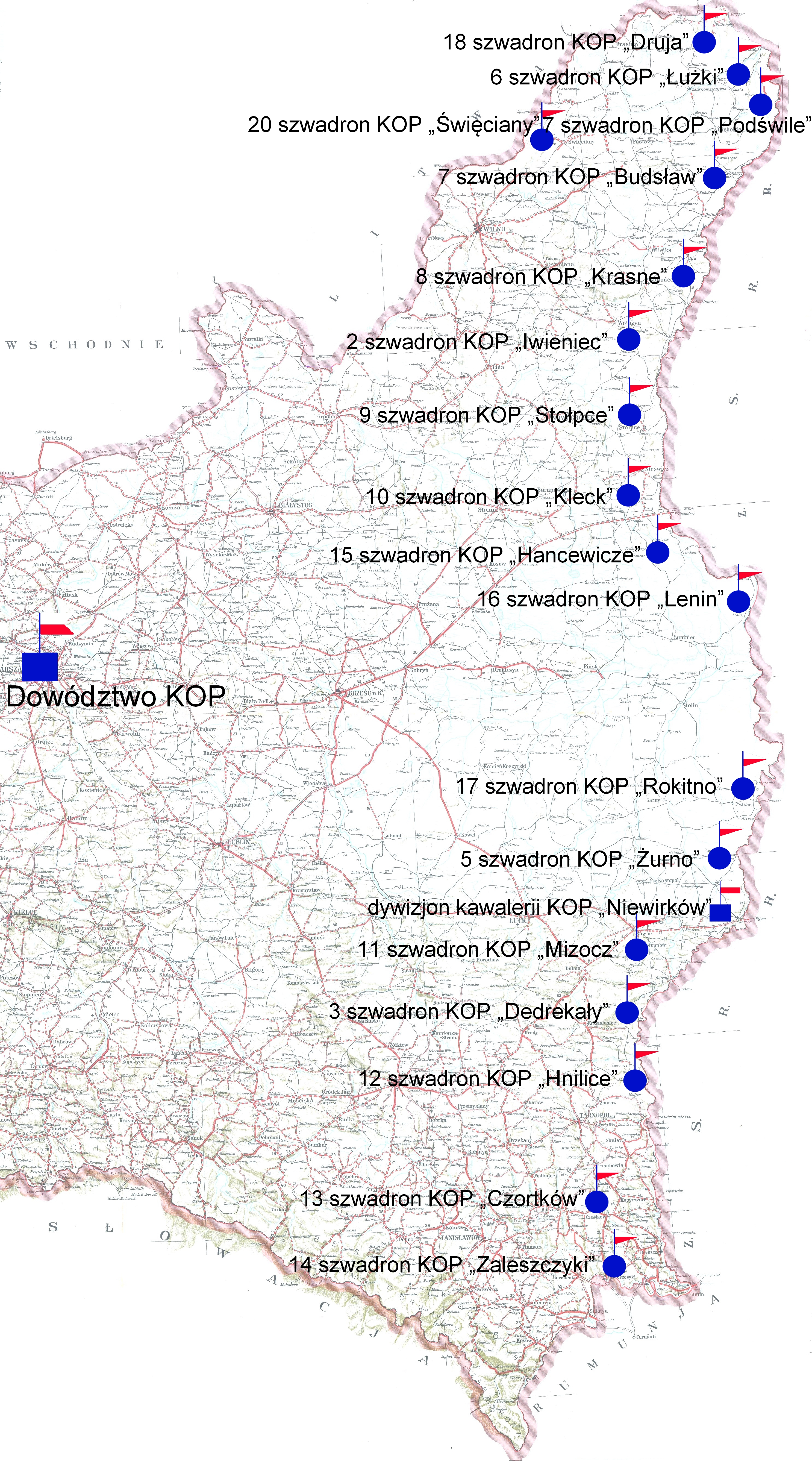 Rozmieszczenie jednostek kawalerii Korpusu Ochrony Pogranicza